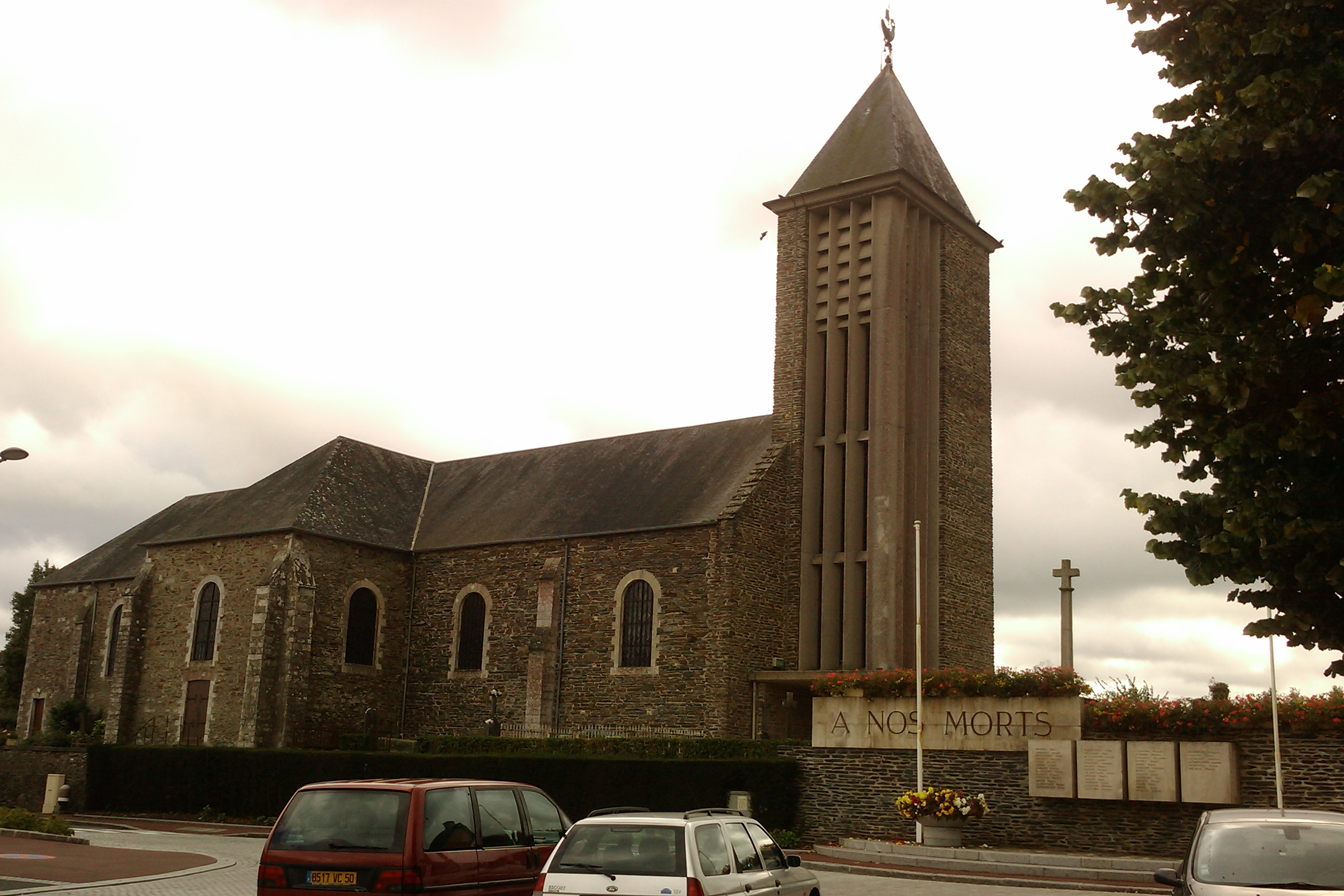 Église Saint-Jean-Baptiste d'Agneaux